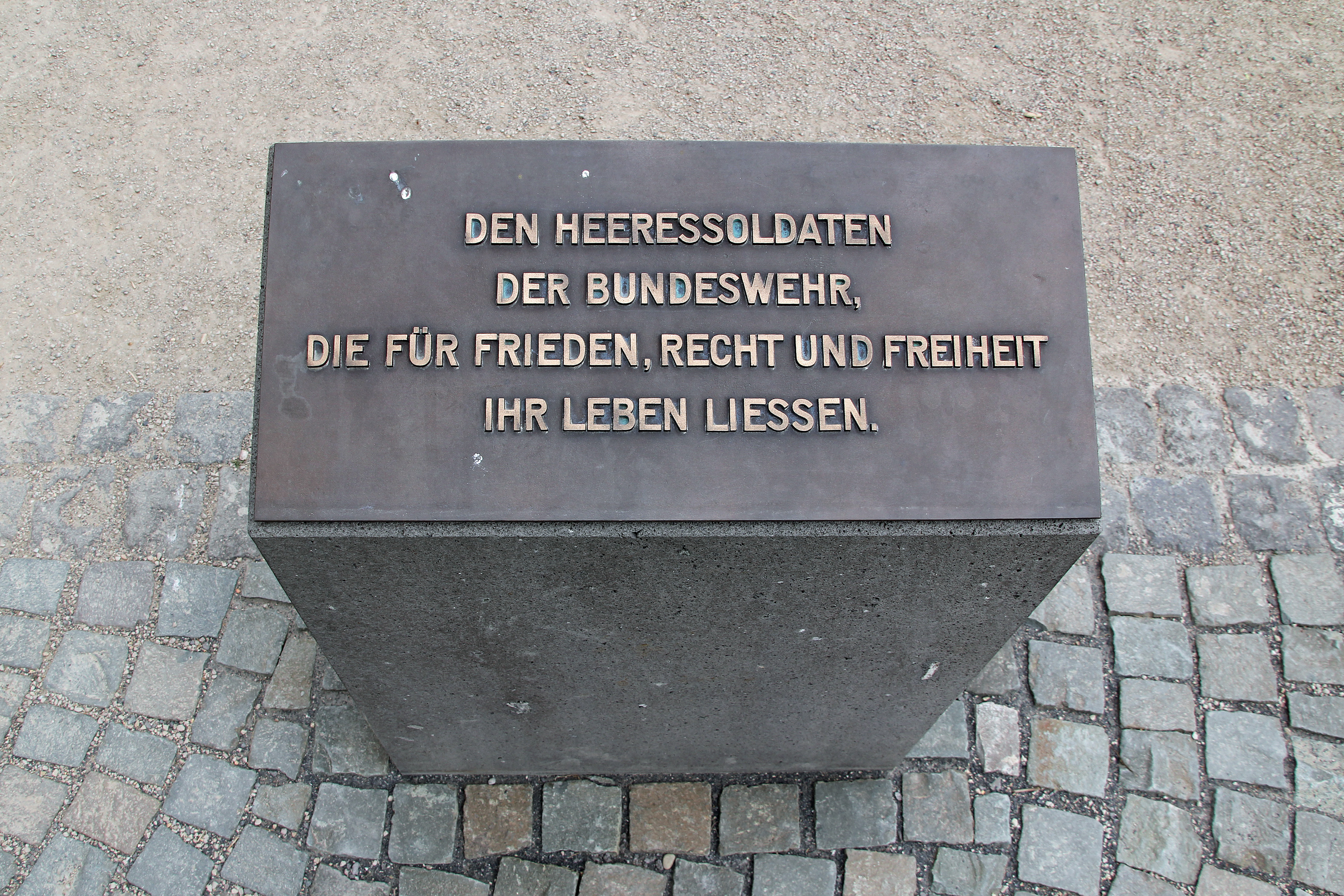 Koblenz im Buga-Jahr 2011 - Das Ehrenmal des Deutschen Heeres auf der Festung Ehrenbreitstein